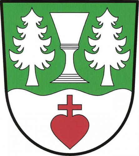 znak, Nové Hutě, okres Prachatice